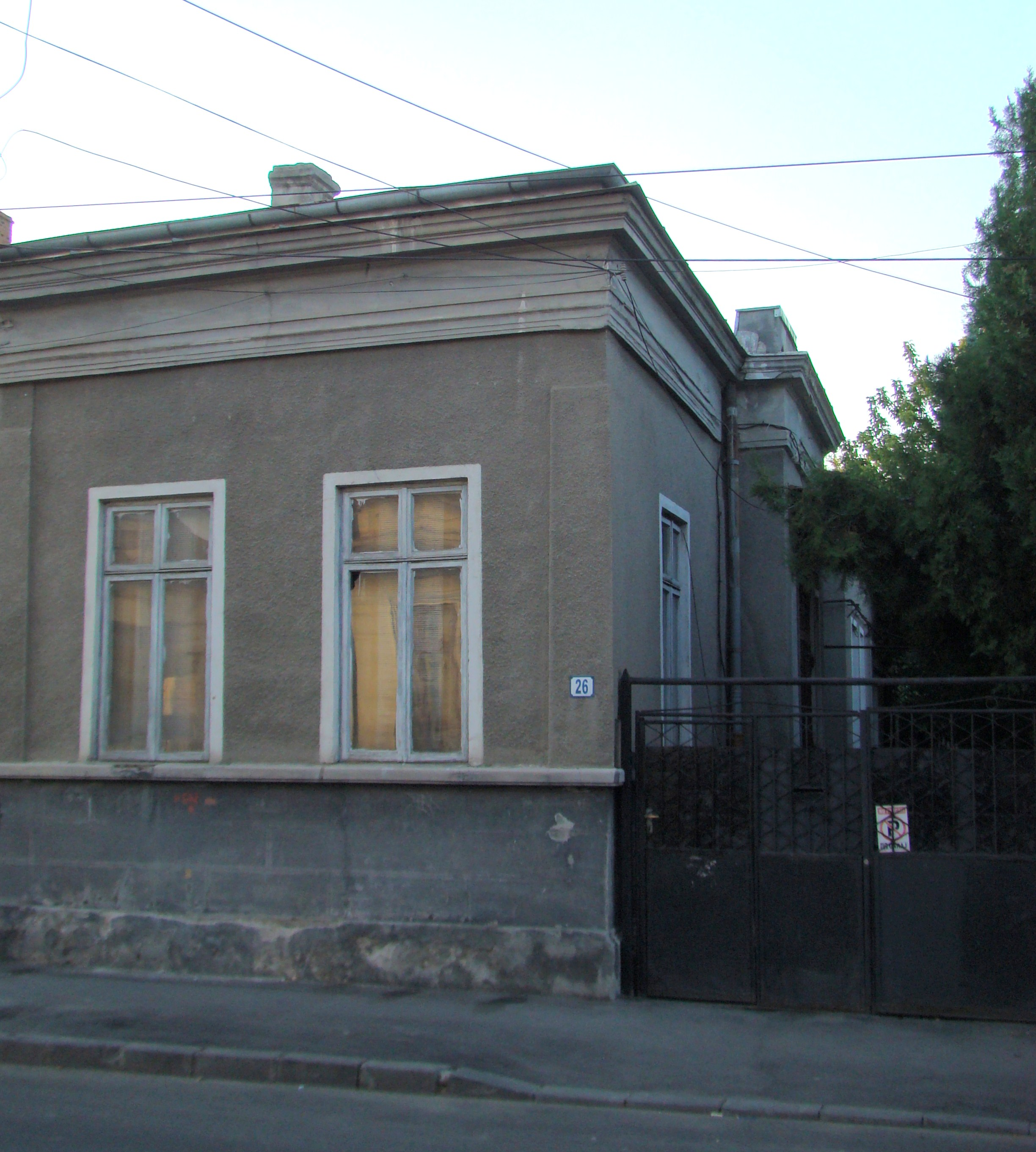 Clădire monument istoric, str. Mircea Vulcănescu, nr.26